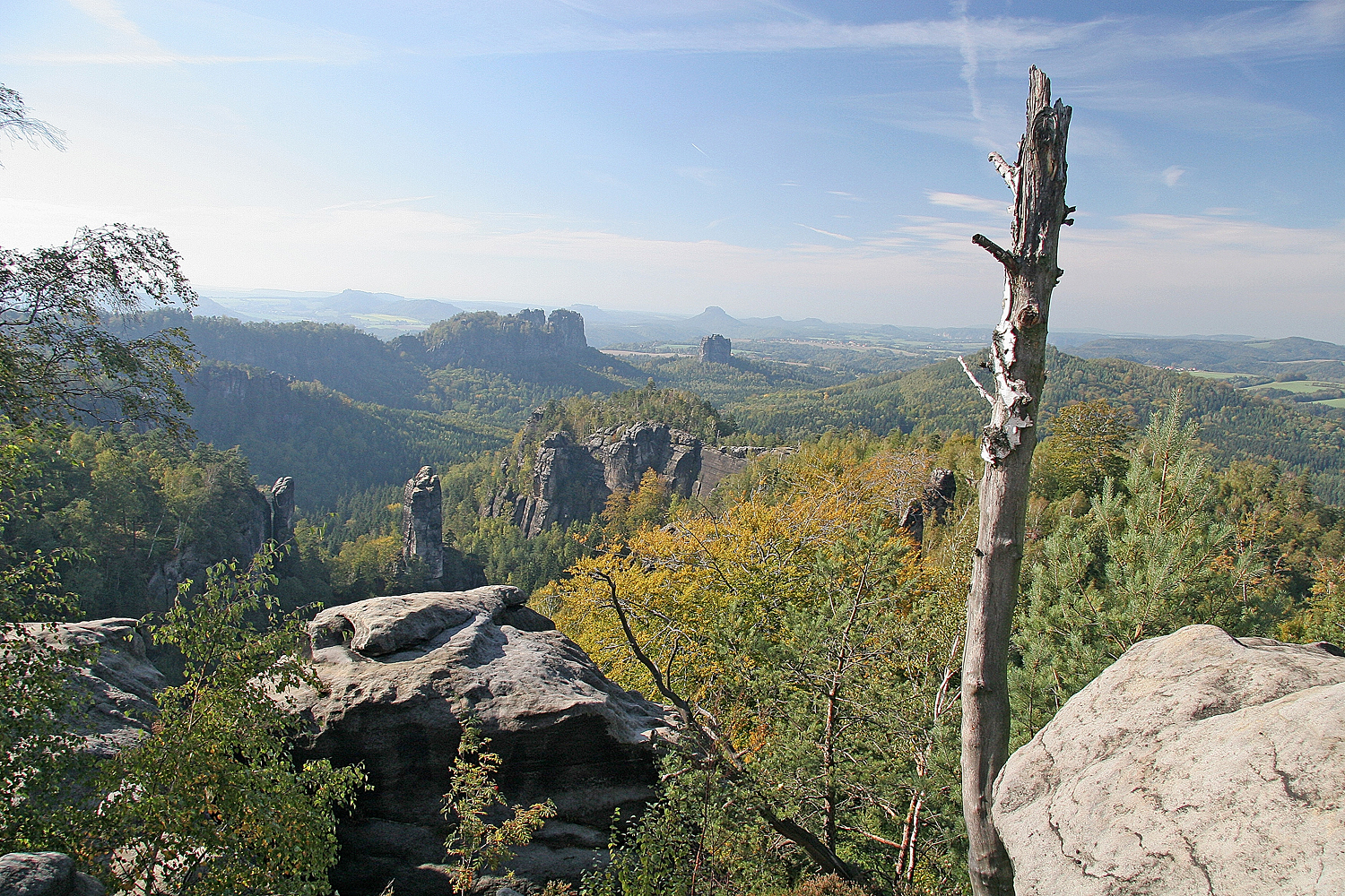 Carolafelsen in Saxony Switzerland autor: Prazak date: 11. 10. 2006